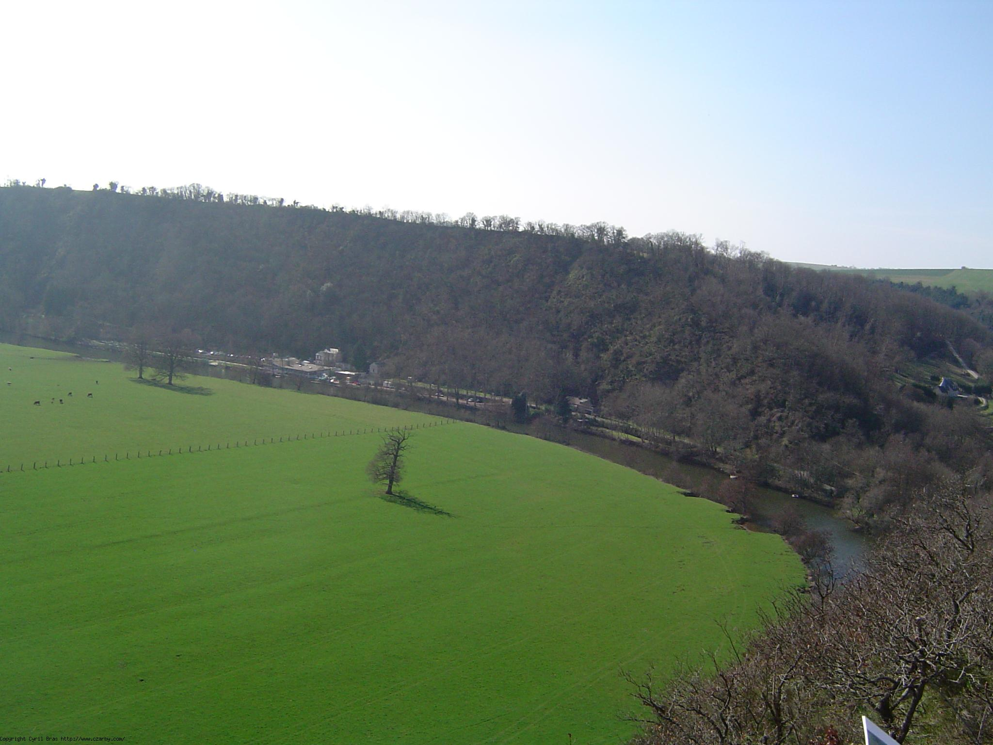 La vallée de l'Orne près de Thury Harcourt. Le fleuve décrit une courbe en fer à cheval à cet endroit. 2005. Cevenol2